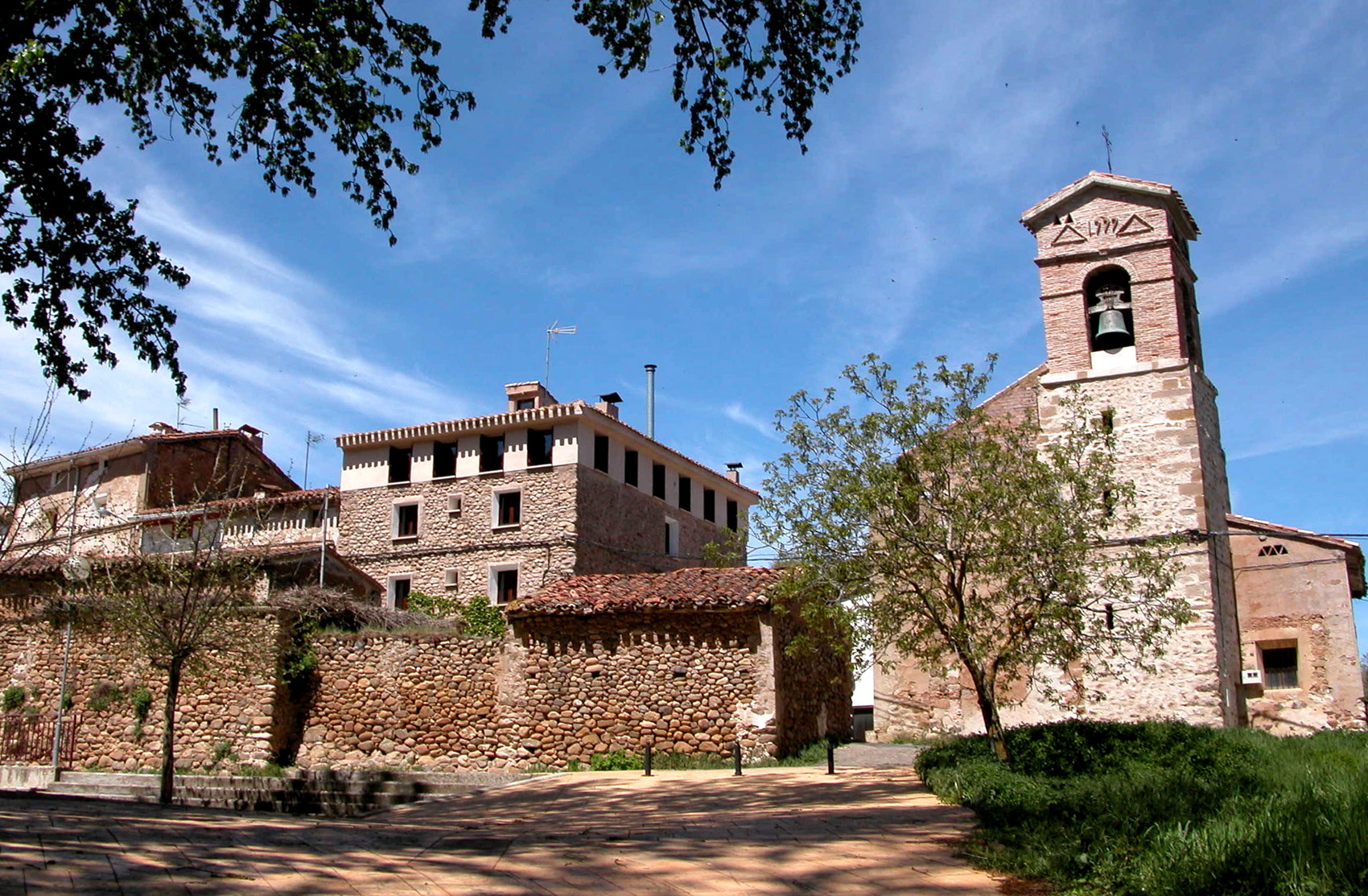 Las Ruedas de Ocón, aldea de Ocón (La Rioja - España)